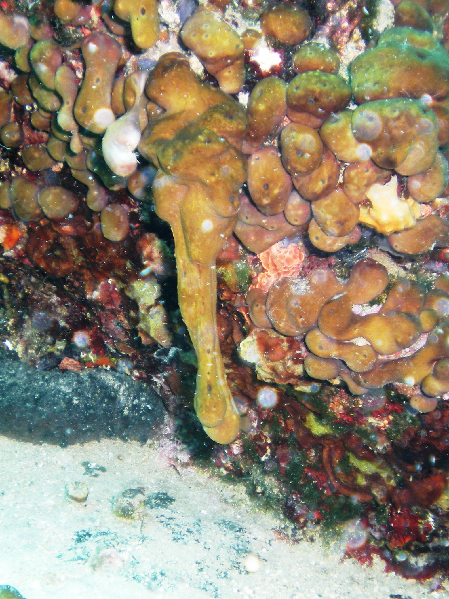 Chondrilla nucula Schmidt, 1862 Mar Adriatico, isola di Brač